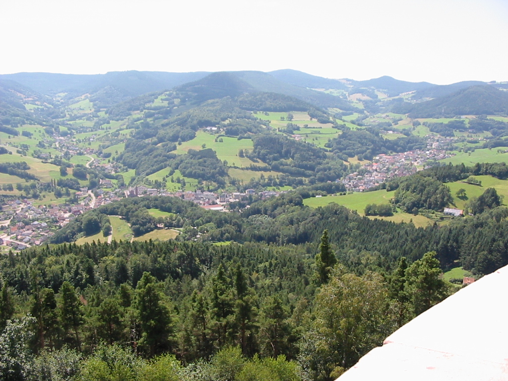 Vue d'ensemble de la commune d'Orbey depuis la Tour du Faudé